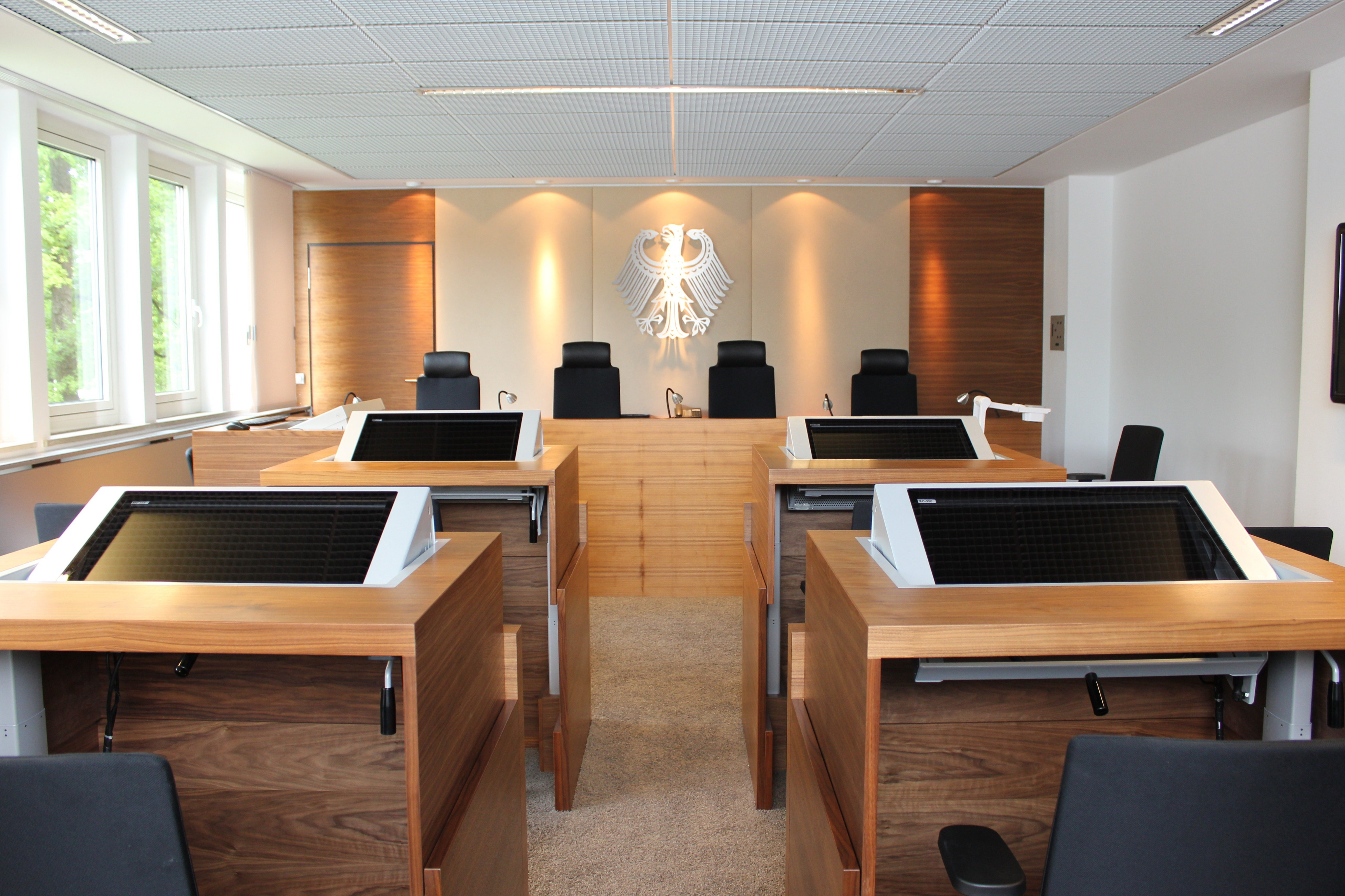 Das Bundespatentgericht in München. Fotografiert im Rahmen des Landtagsprojektes Bayern 2012. Wikipedia im Landtag – Bayern 17. bis 19. Juli 2012 in München Dieses Foto wurde im Rahmen des Projektes „Wikipedia im Landtag“ erstellt.